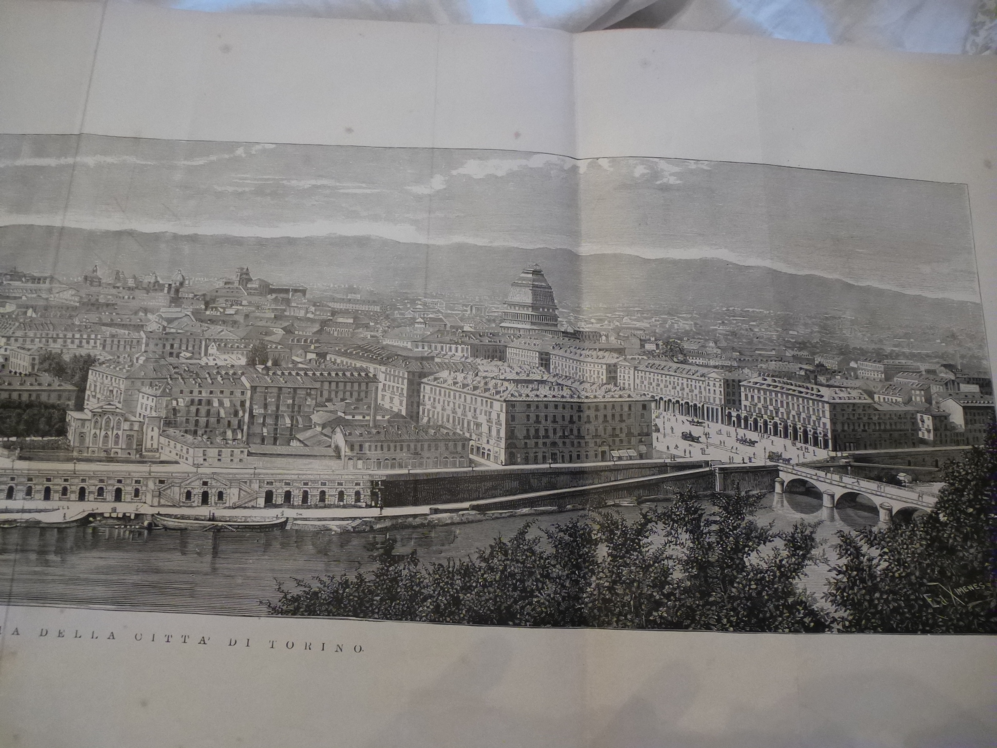 Raffigurazione di Torino nel 1884, per l'Esposizione Generale Italiana. Si noti come la Mole non sia ancora stata completata. / Drawing of Turin in 1884, in occasion of the Italian General Exposition. Note that Mole Antonelliana was not yet completed.